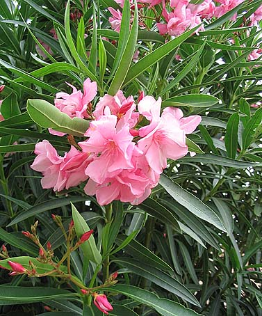 Nerium oleander in Ille-sur-Têt - France.